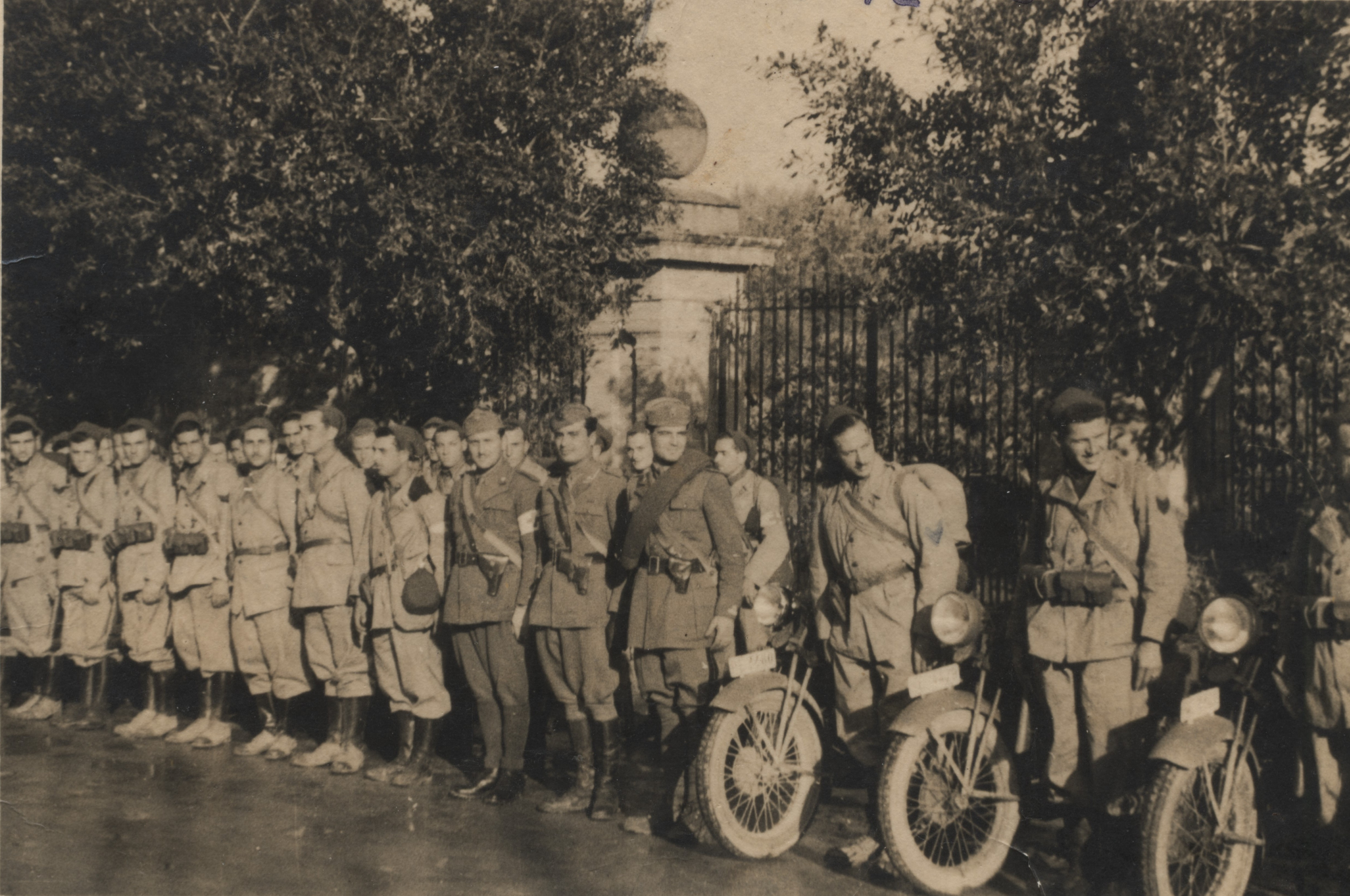 Plotone Comando del XVI Btg del 10° Rgt. Bersaglieri a Ficarazzi Nov 40 in assetto di guerra